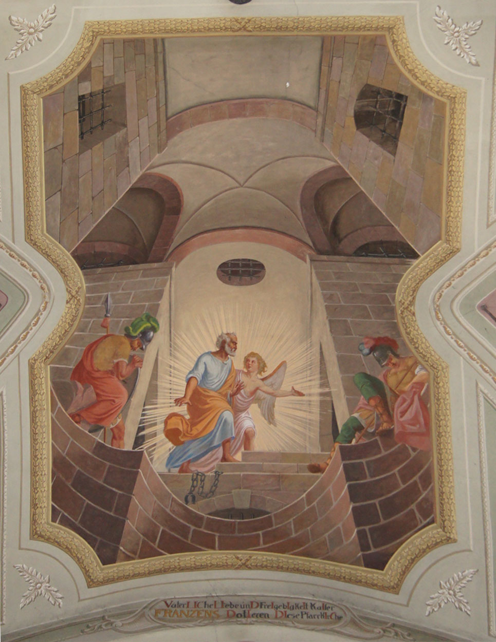 Pfarrkirche Vomp, zentrales Fresko (Befreiung Petri)